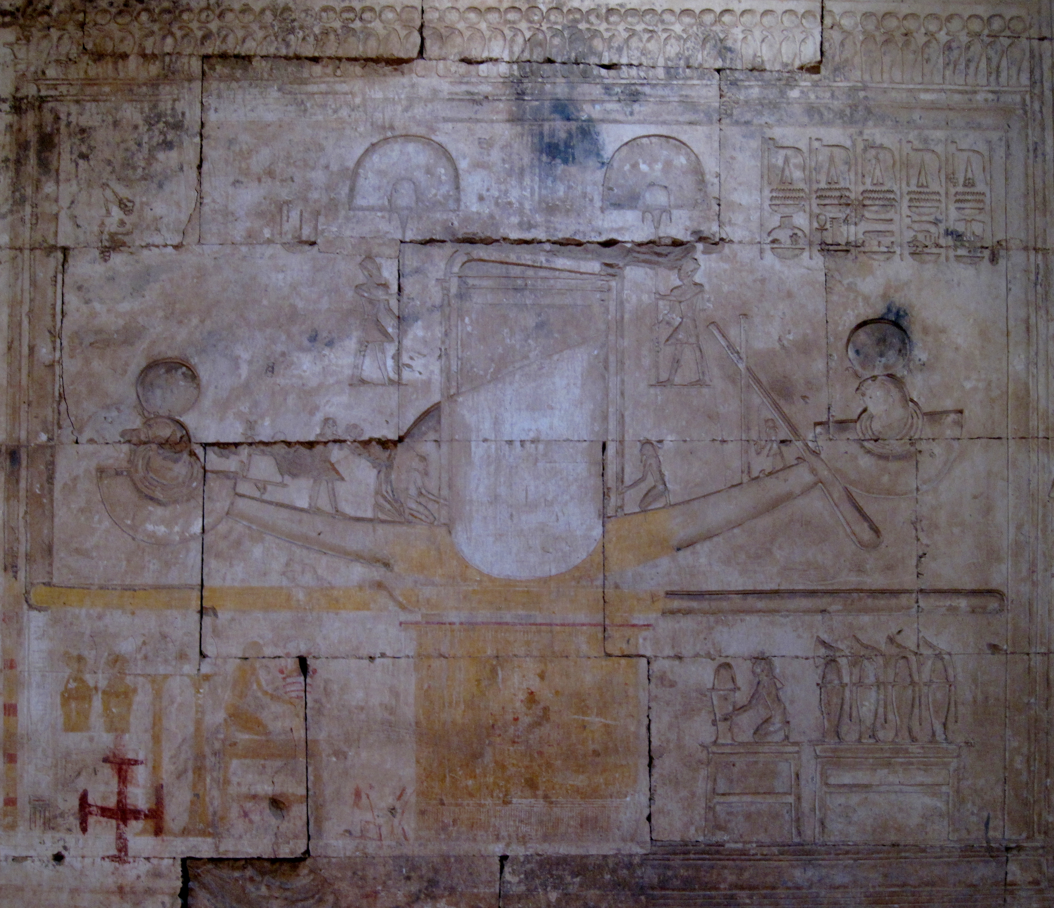 Barkenhalle im Totentempel Sethos I. in Abydos, Ägypten